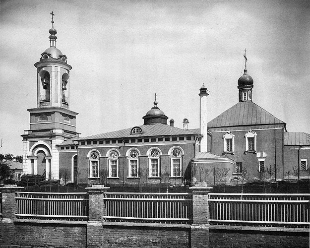 Храм Рождества Иоанна Предтечи на Пресне